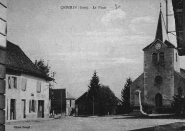 Chimilin - la place de l'église au début du XX siècle, carte postale.